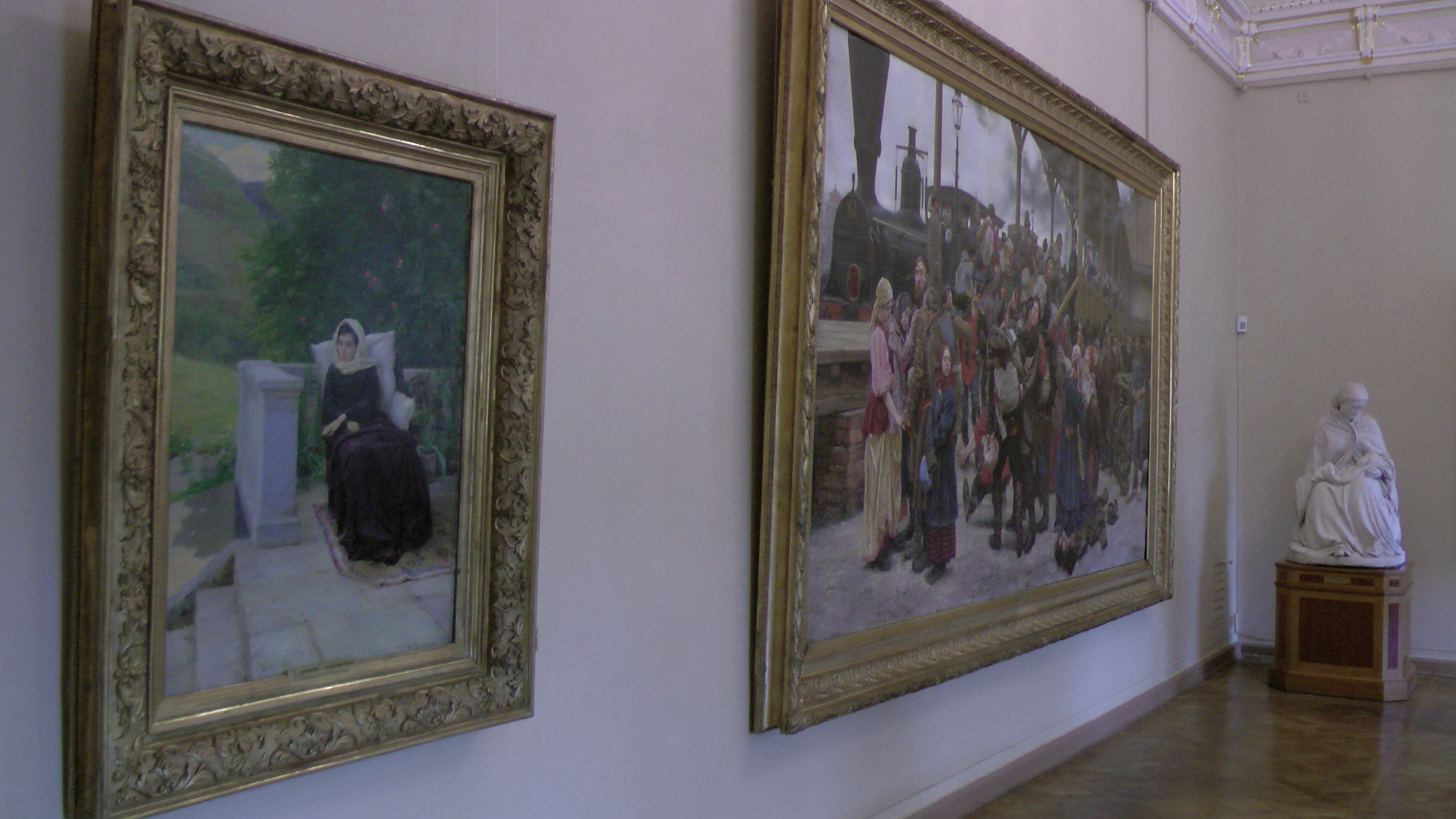 Картина В тёплых краях в постоянной экспозиции Русского музея